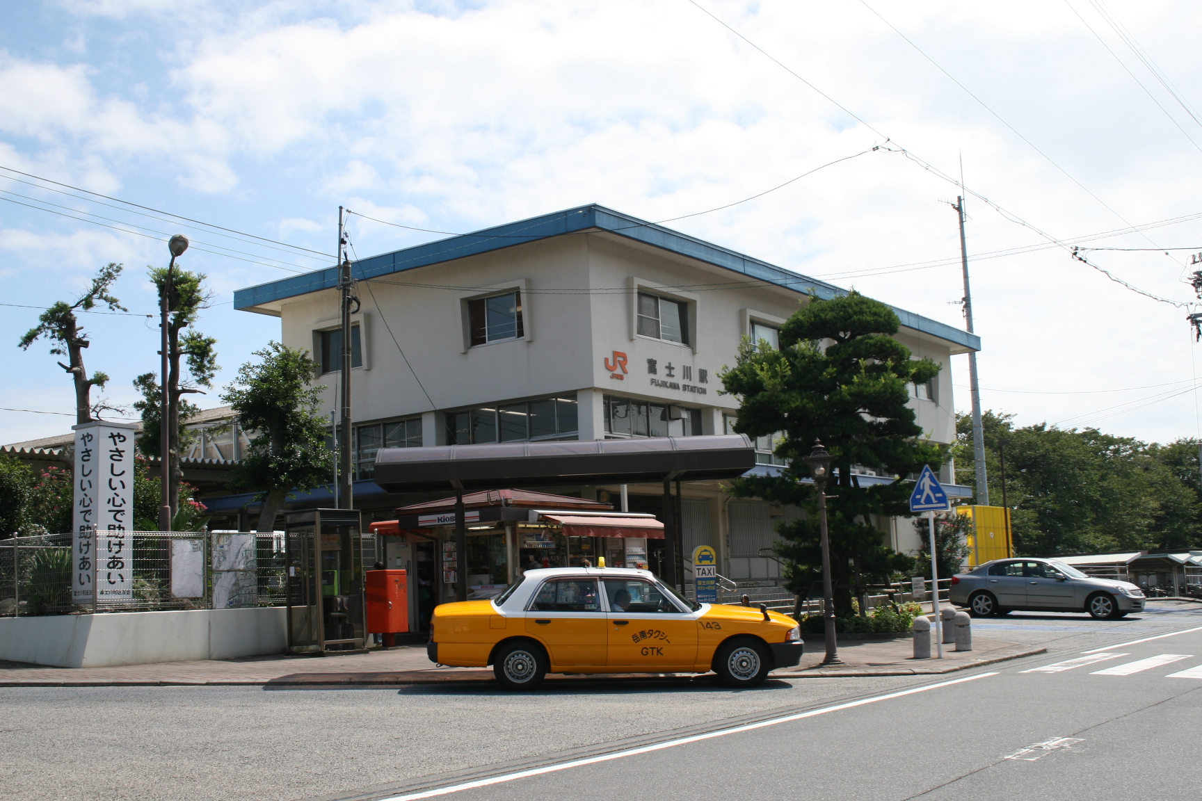 Fujikawa Station, a railway station in Fuji, Shizuoka, Japan